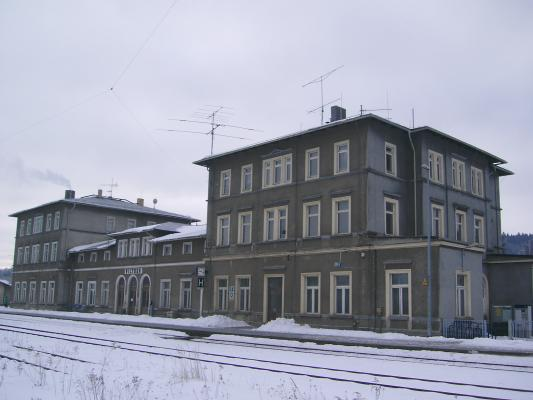 Bahnhof Wilthen selbst erstellt und auf veröffentlicht